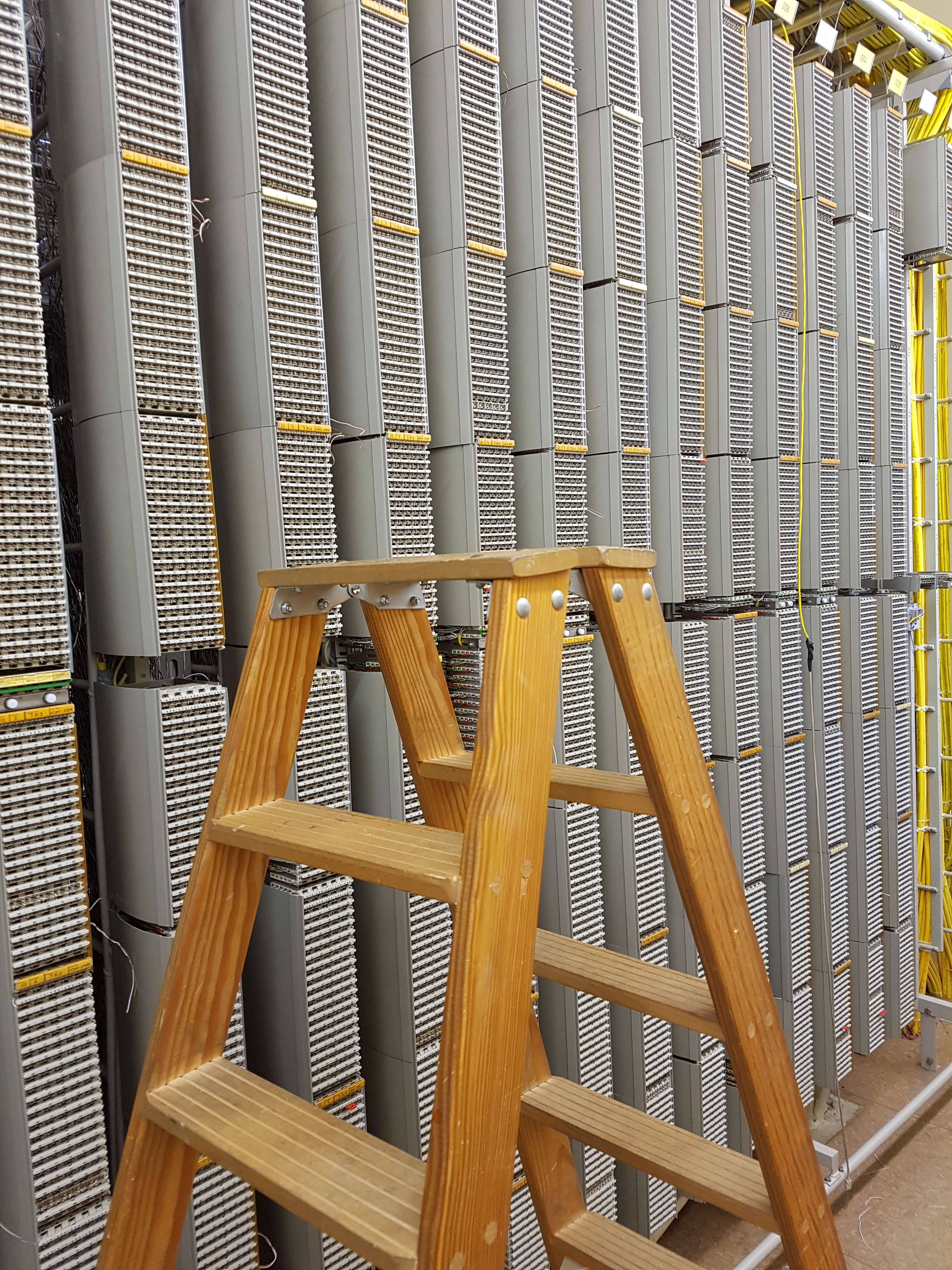 Senktrechte Reihe im HVT